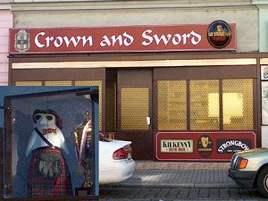 Vereinslokal des Steeldartvereins An Sporran